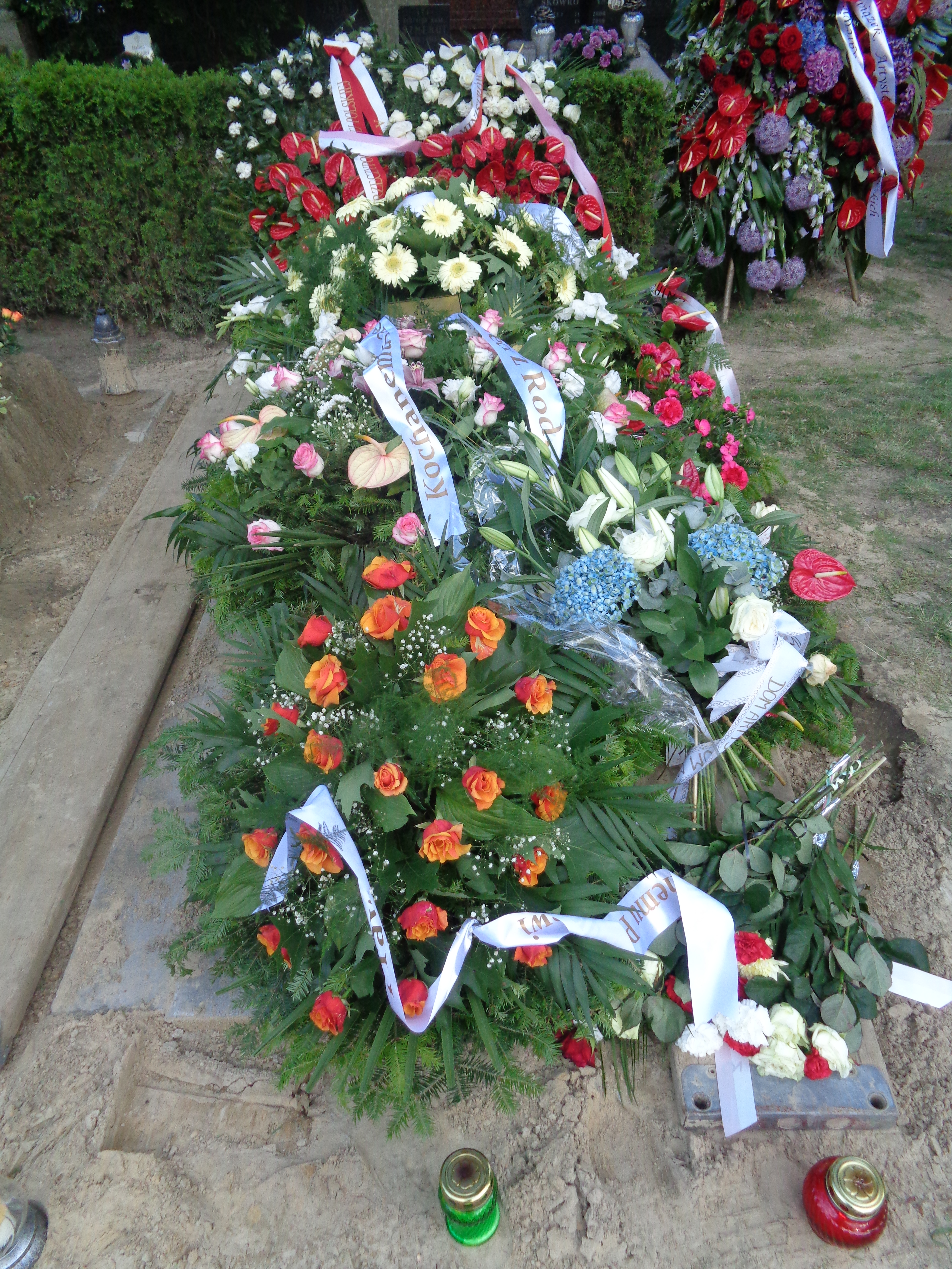 Grób pisarki Emila Karewicza na Cmentarzu Wojskowym na Powązkach w Warszawie